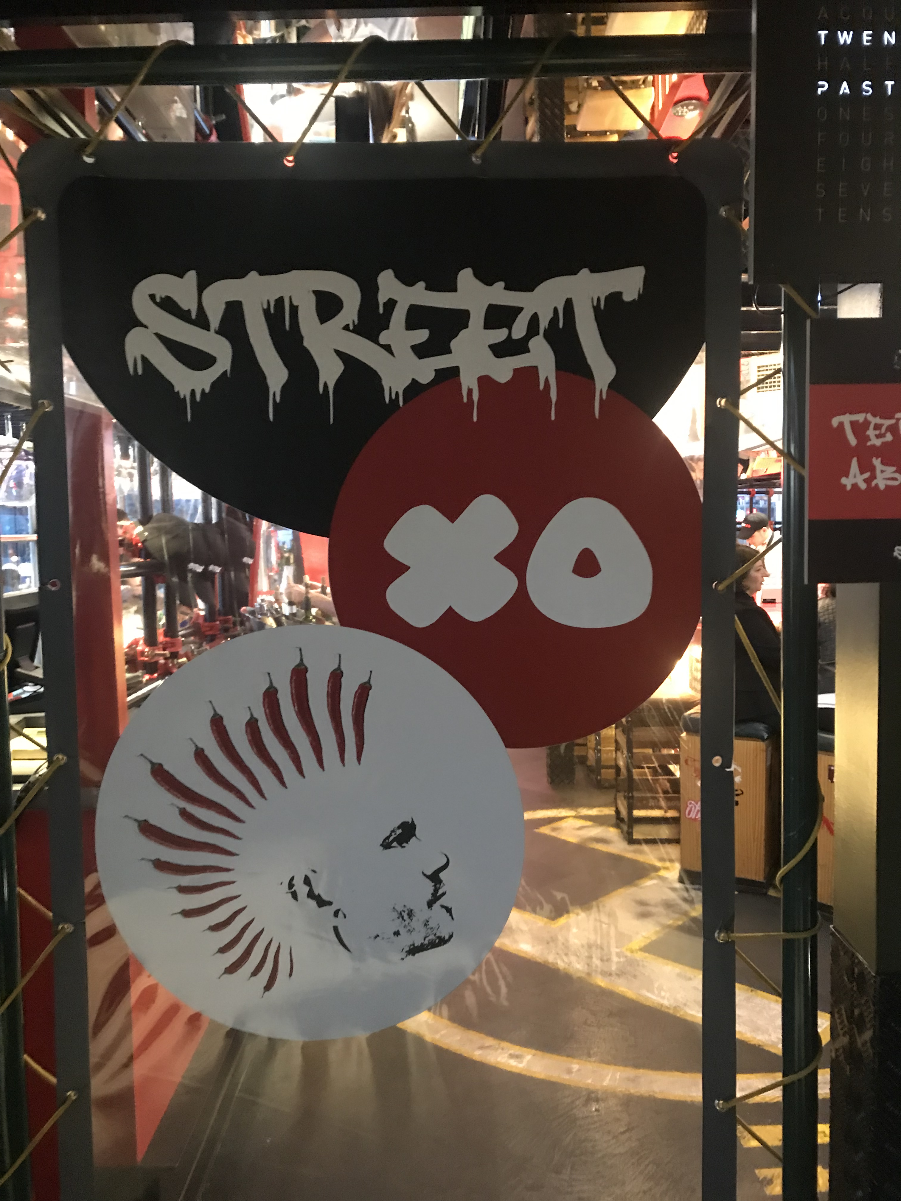 Descripcion